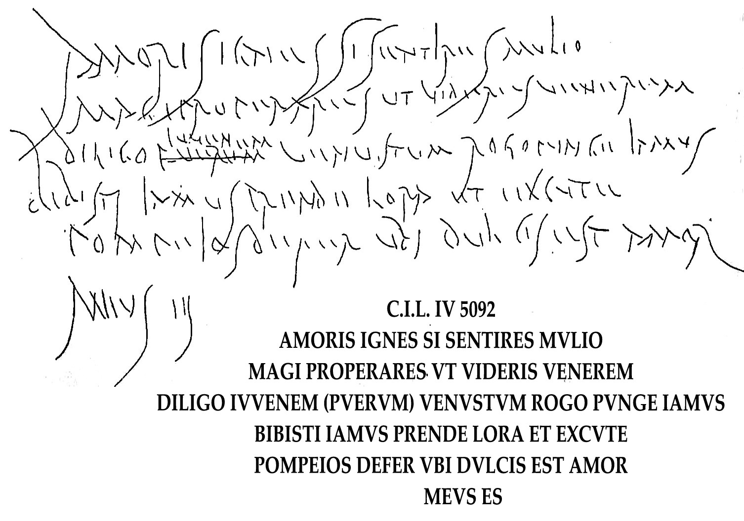 Inscripción pompeyana